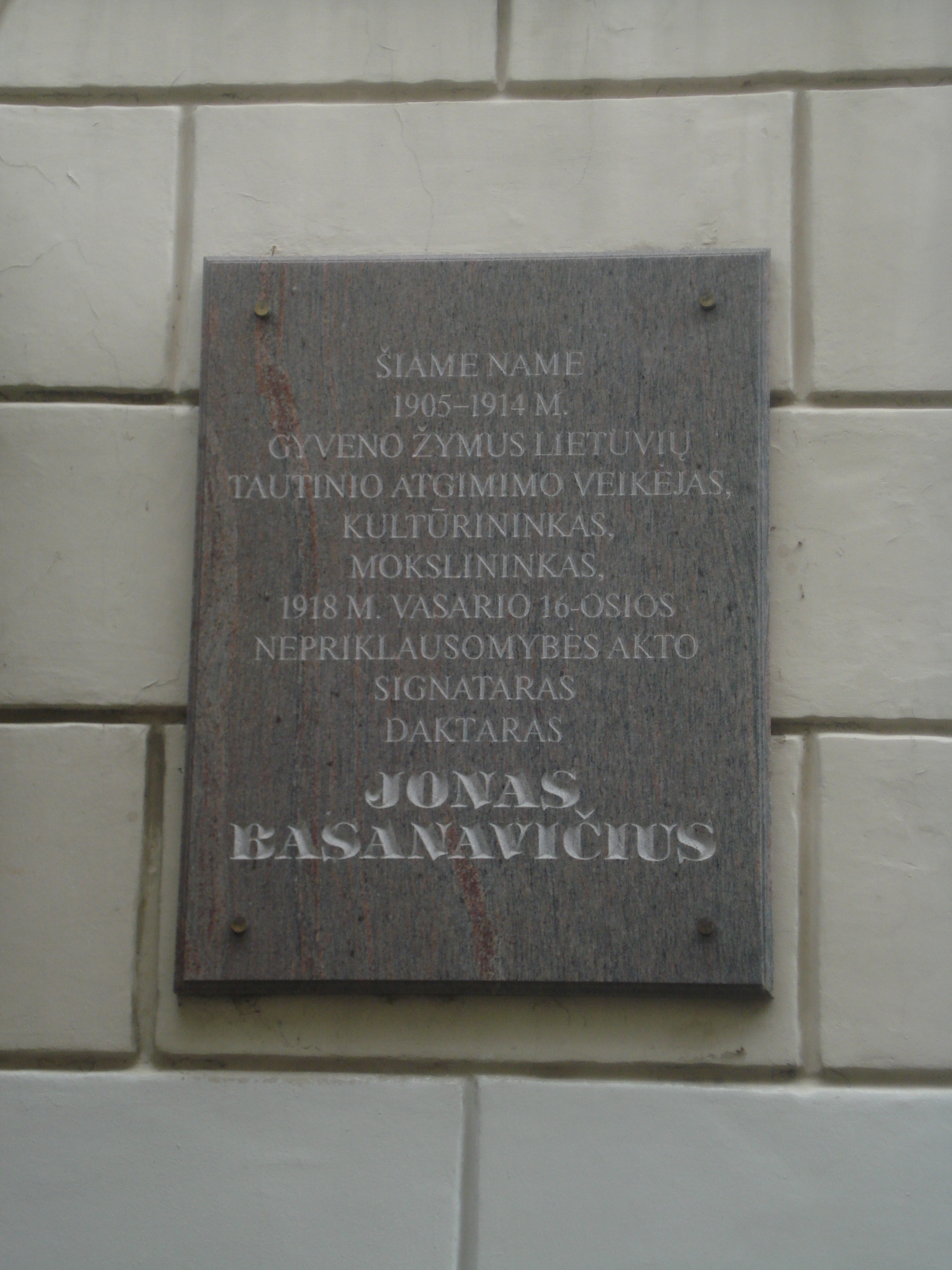 Jonas Basanavičius memorial plaque in Vilnius (Bokšto g. 2).